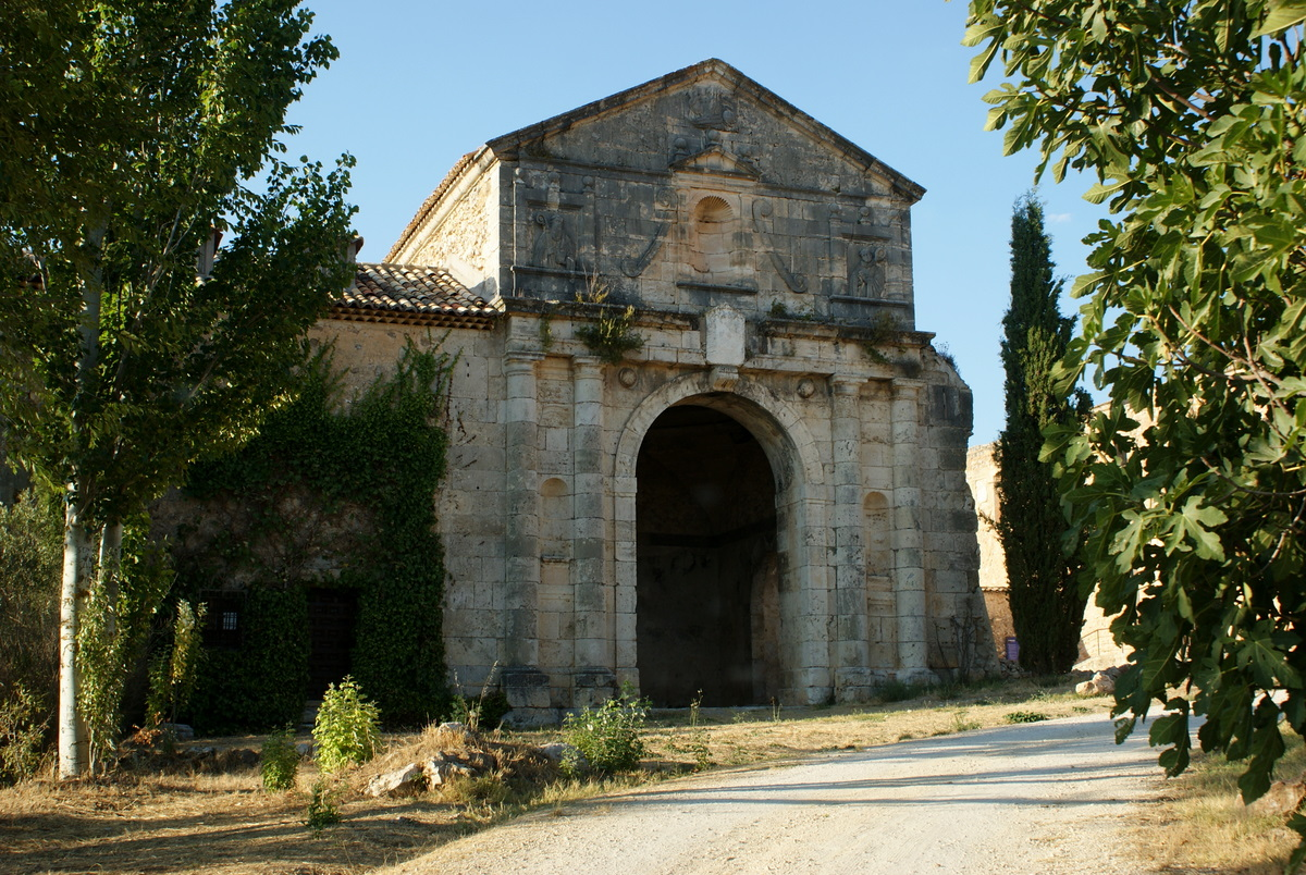 Casa del guarda o portería del Monasterio de Monsalud, sito en Córcoles, pedanía de Sacedón, entre los ríos Guadiela y Tajo. Monasterior cisterciense del S. XII. Monasterio de Monsalud, Córcoles, Sacedón, Guadalajara. Castilla-La Mancha